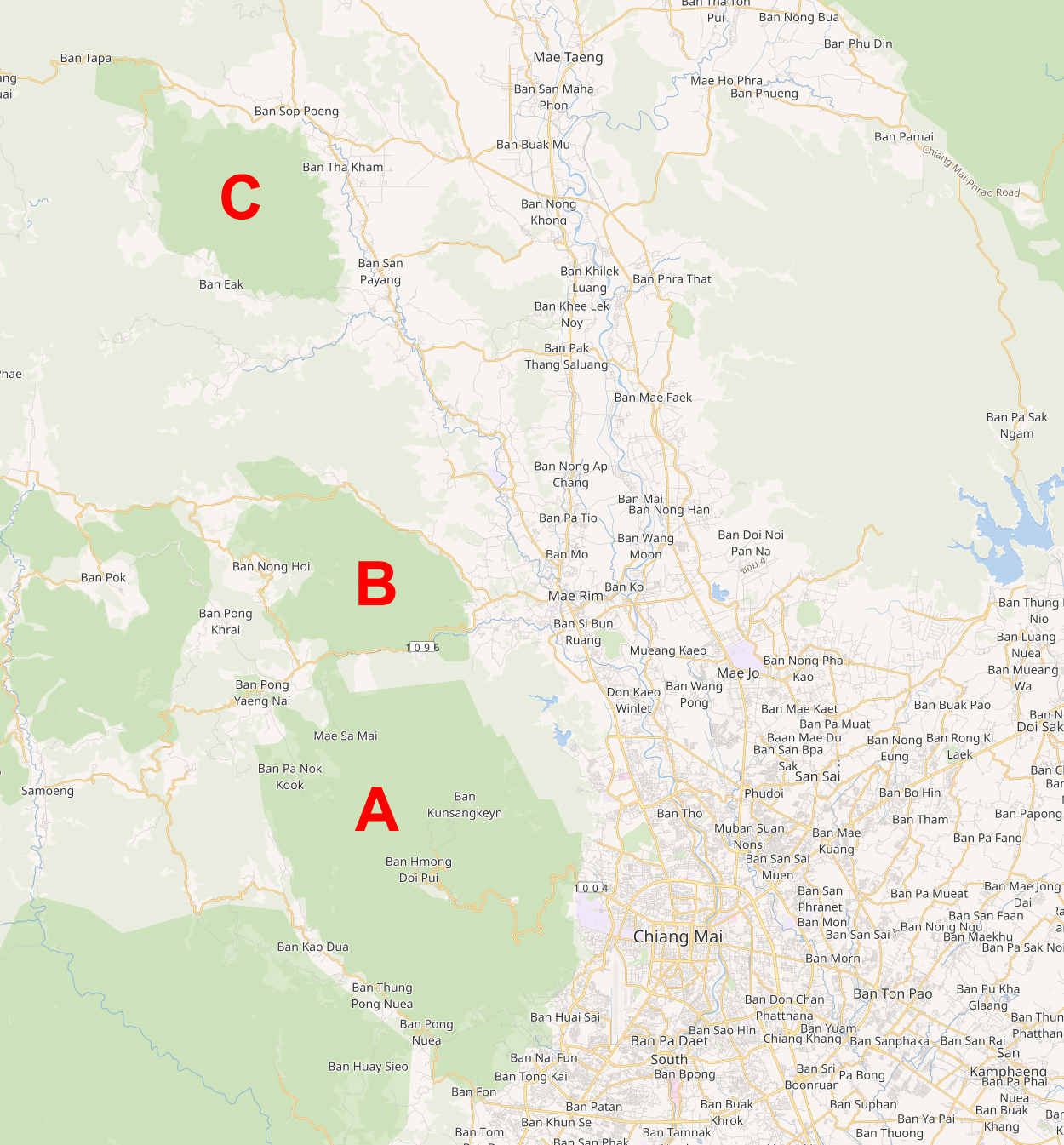 Het Nationale Park Doi Suthep-Pui bestaat uit het heel bekende deel rond de beide bergen Doi Suthep en Doi Pui, maar daarnaast maken enkele andere gebieden ook deel uit van het park.